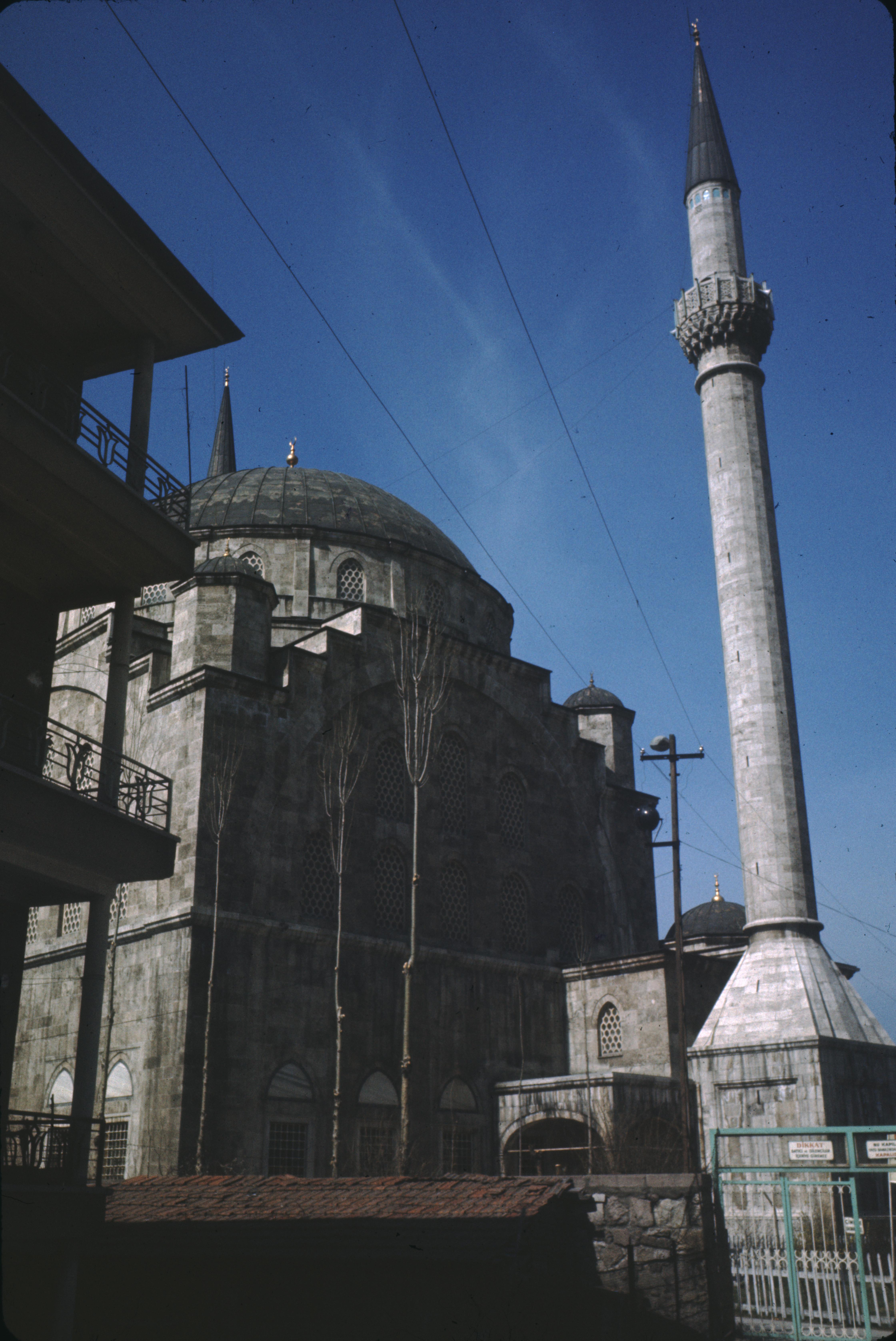 CyberViewX v5.16.55 Model Code=58 F/W Version=1.21